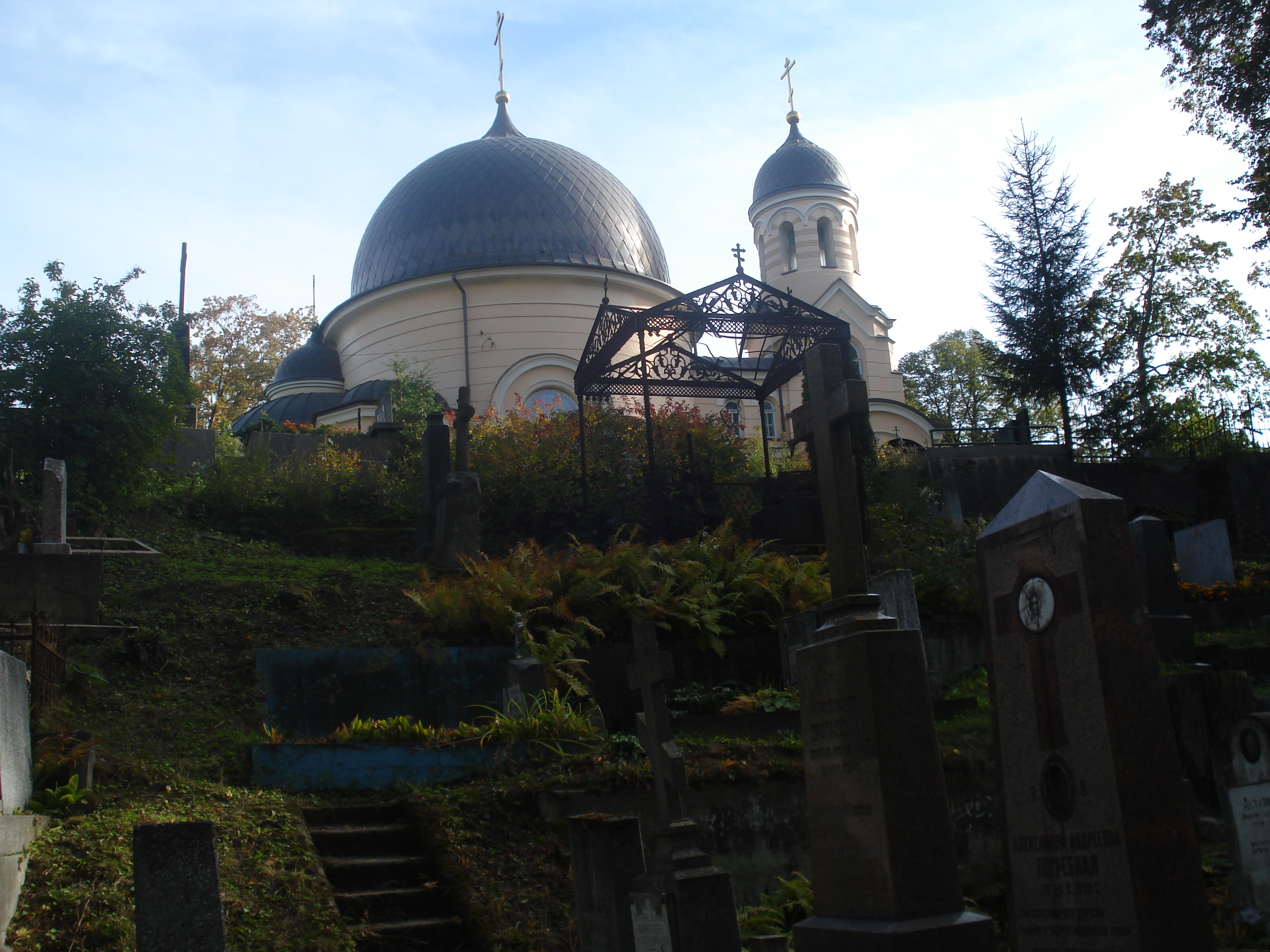 Orthodox Church of Saint Euphrosyne in Vilnius (Liepkalnių g.)